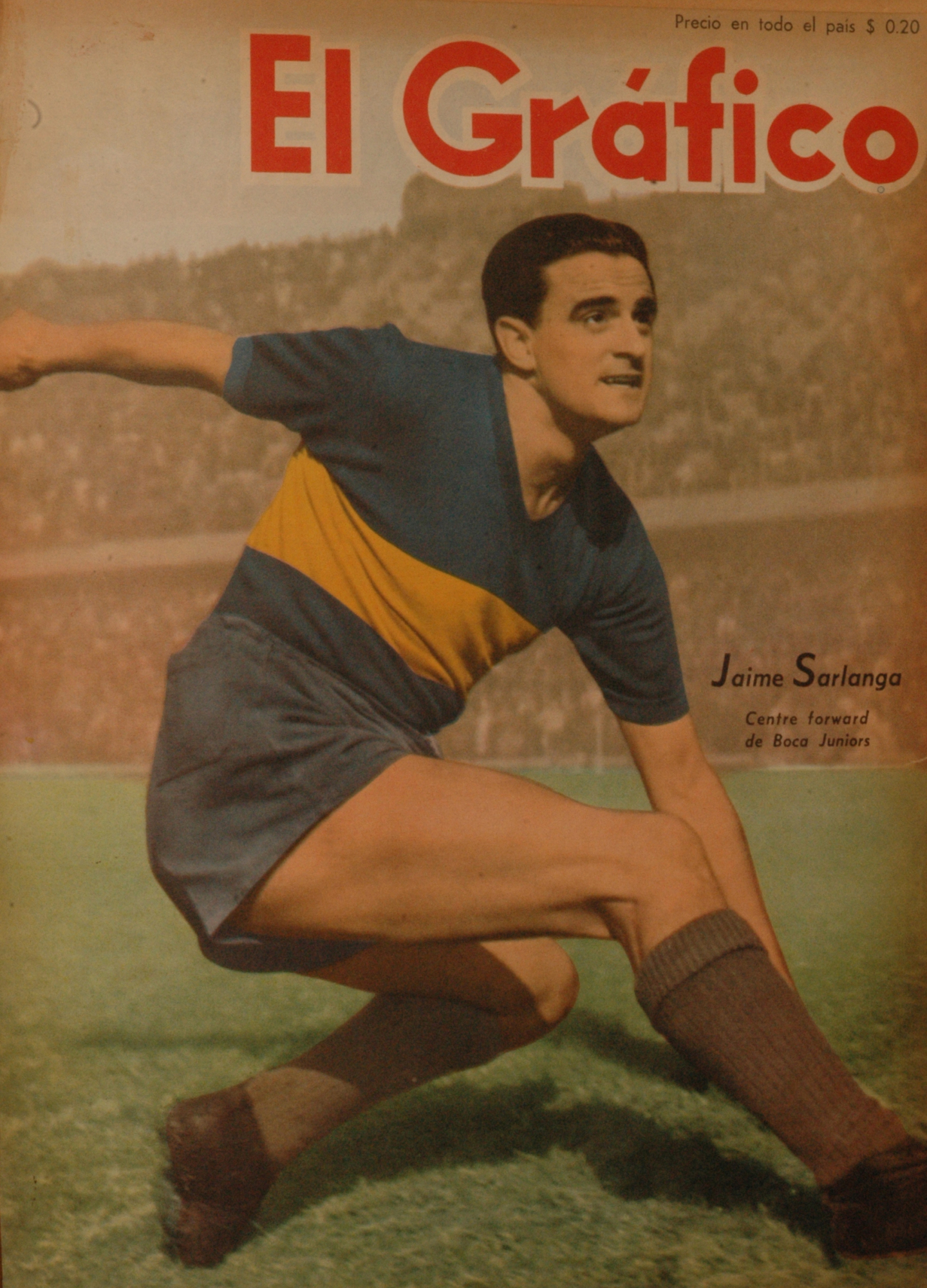 El Grafico del 01 de Noviembre de 1946. Edicion 1425